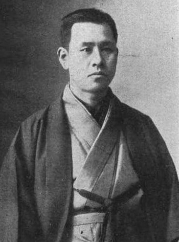 野沢源次郎（1868-）。貿易商・野沢卯之吉の長男で、慶應義塾卒業後、父とともに東京谷中初音町で商社「野沢組」を営み、病気療養のため軽井沢に転地、別荘地開発に乗り出す